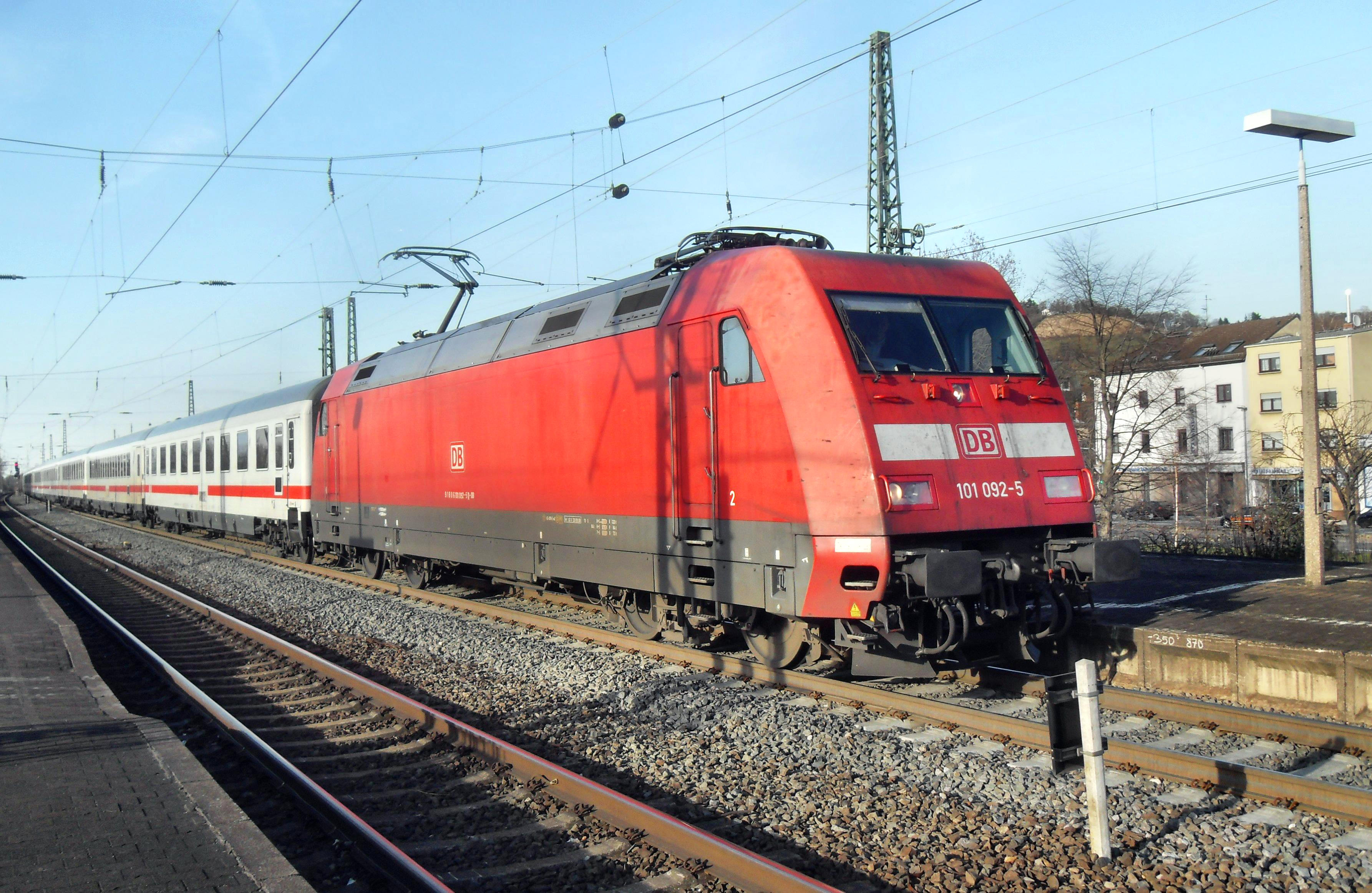 EuroCity der Baureihe 101 im Bensheimer Bahnhof